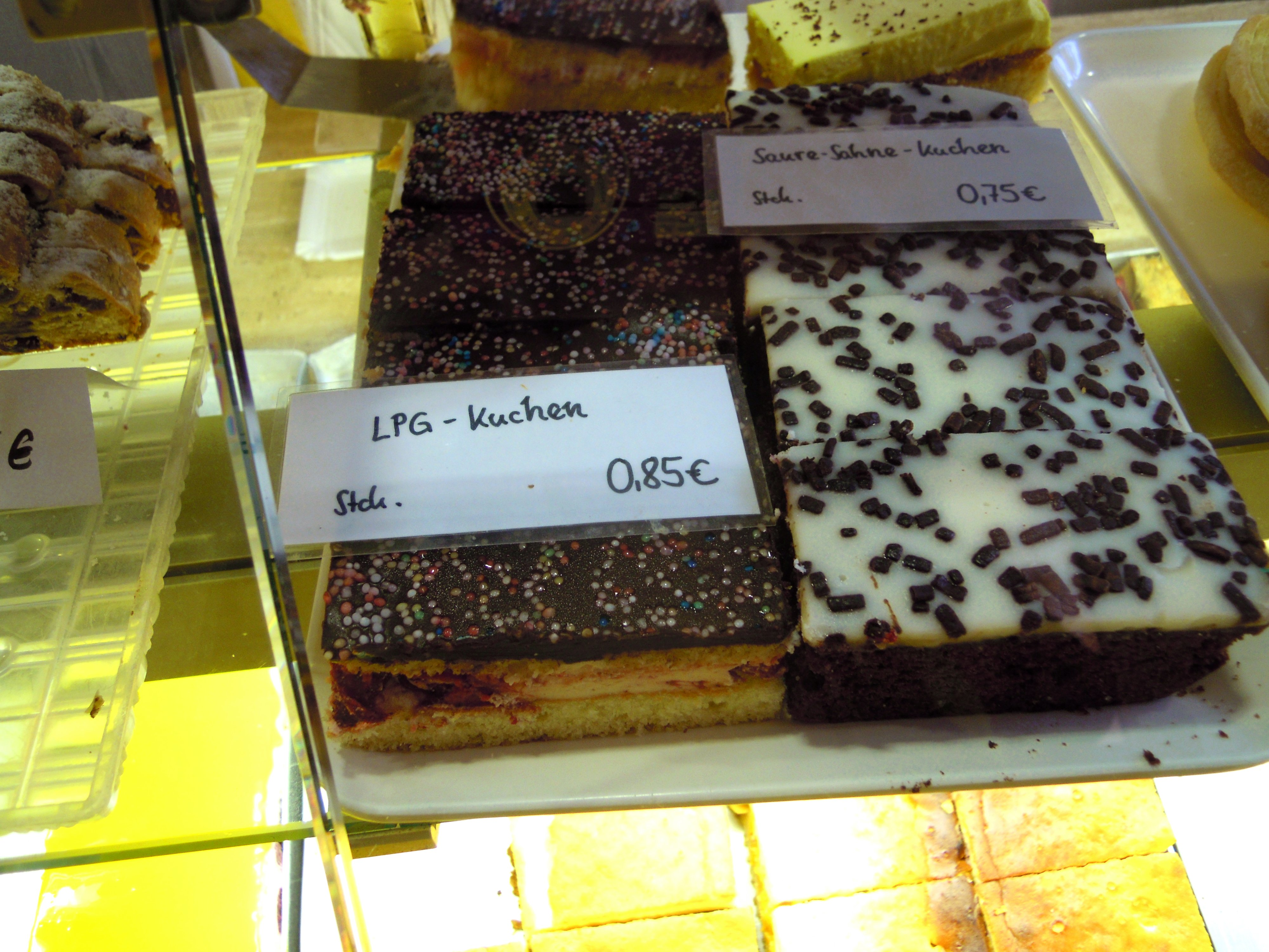 LPG-Kuchen der Bächerei Stephan Brychcy, Hauptmarkt 10, 99867 Gotha